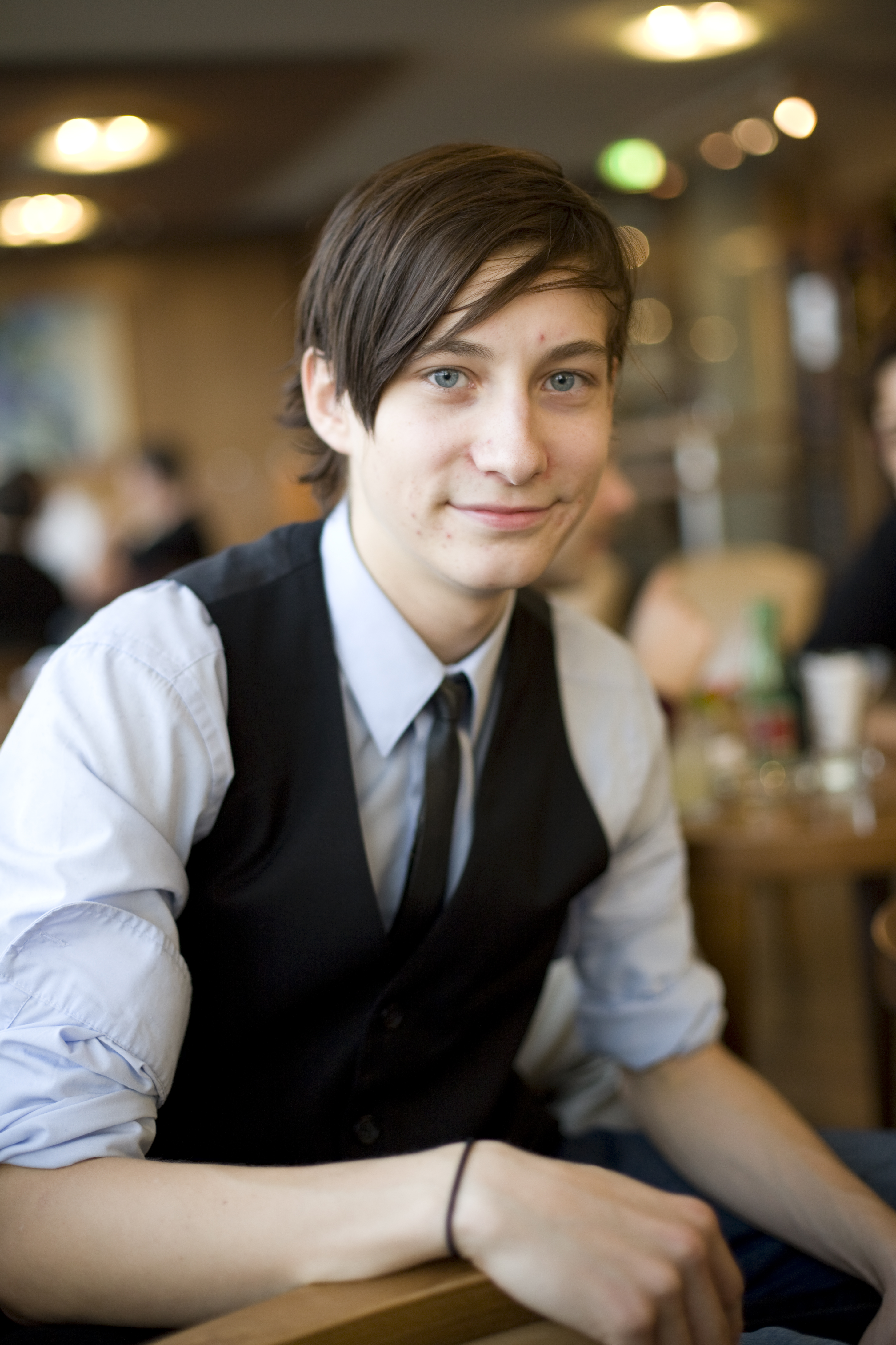 Nikolai Gemel